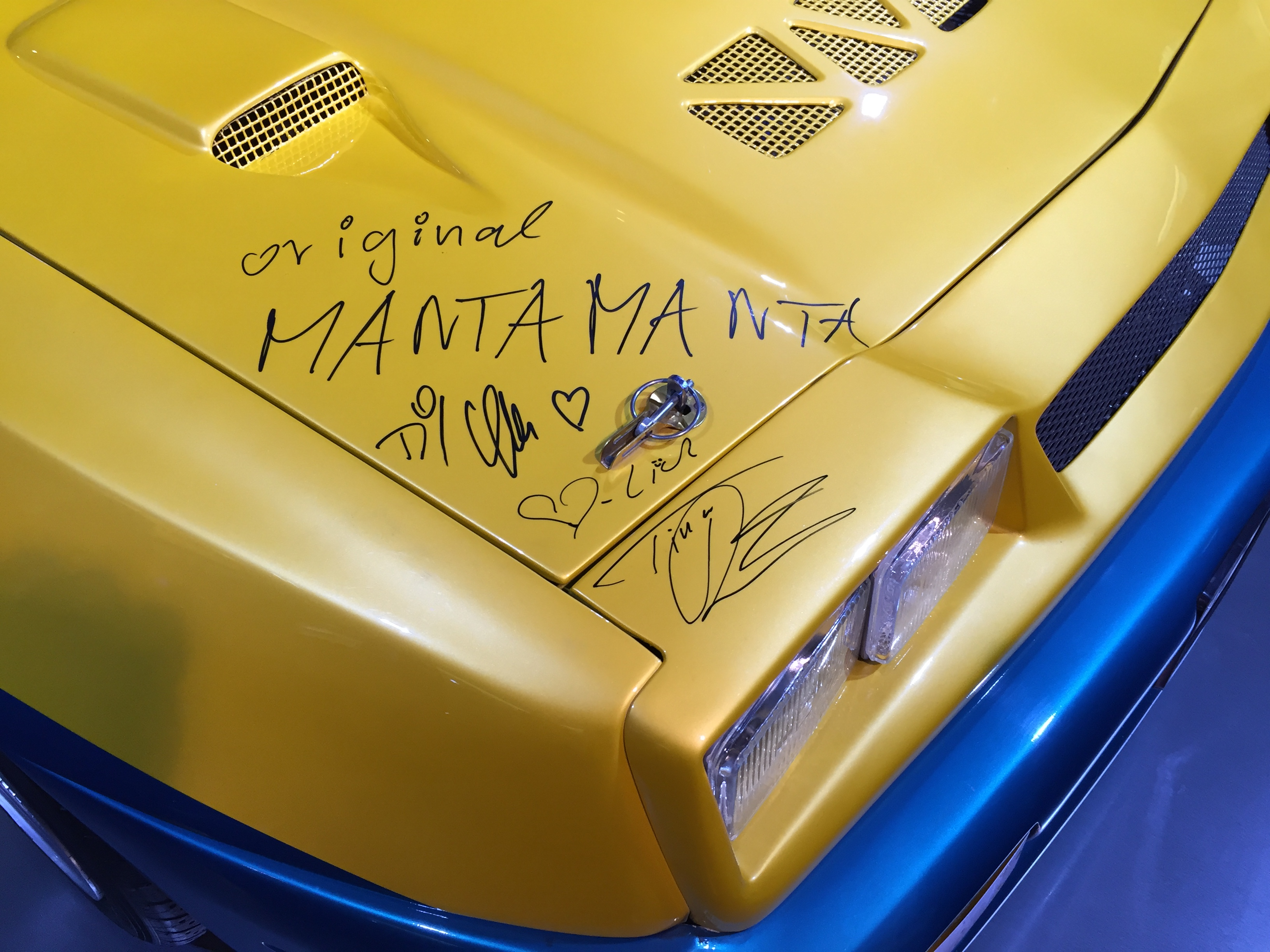 Opel Manta B aus dem Film "Manta, Manta" - Autogramme Tina Ruhland und Till Schweiger auf der Motorhaube